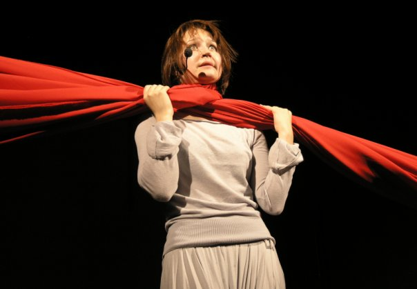 Спектакль "Как я ловил человечков, прыгая на 6 метров в черном пальто" Театра "Ювента"